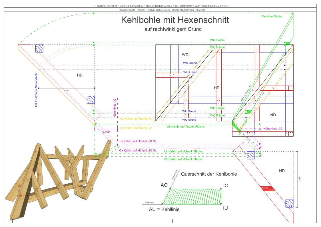 Kehlbohle mit Hexenschnitt auf rechtwinkligem Grund